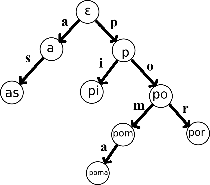 Un trie és una manera d'emmagatzemar un diccionari